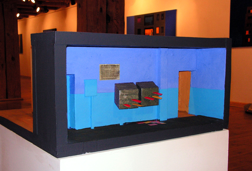 Klatka, "Miejsce Zamieszkania" - Galeria Bałtycka w Ustce 2005r